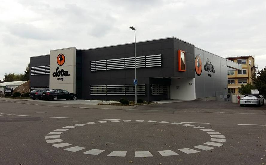 Firmensitz der Loba GmbH & Go KG in Ditzingen